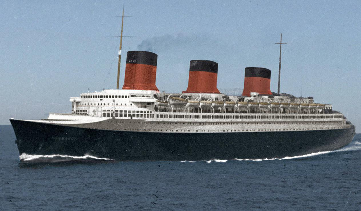 SS Normandie